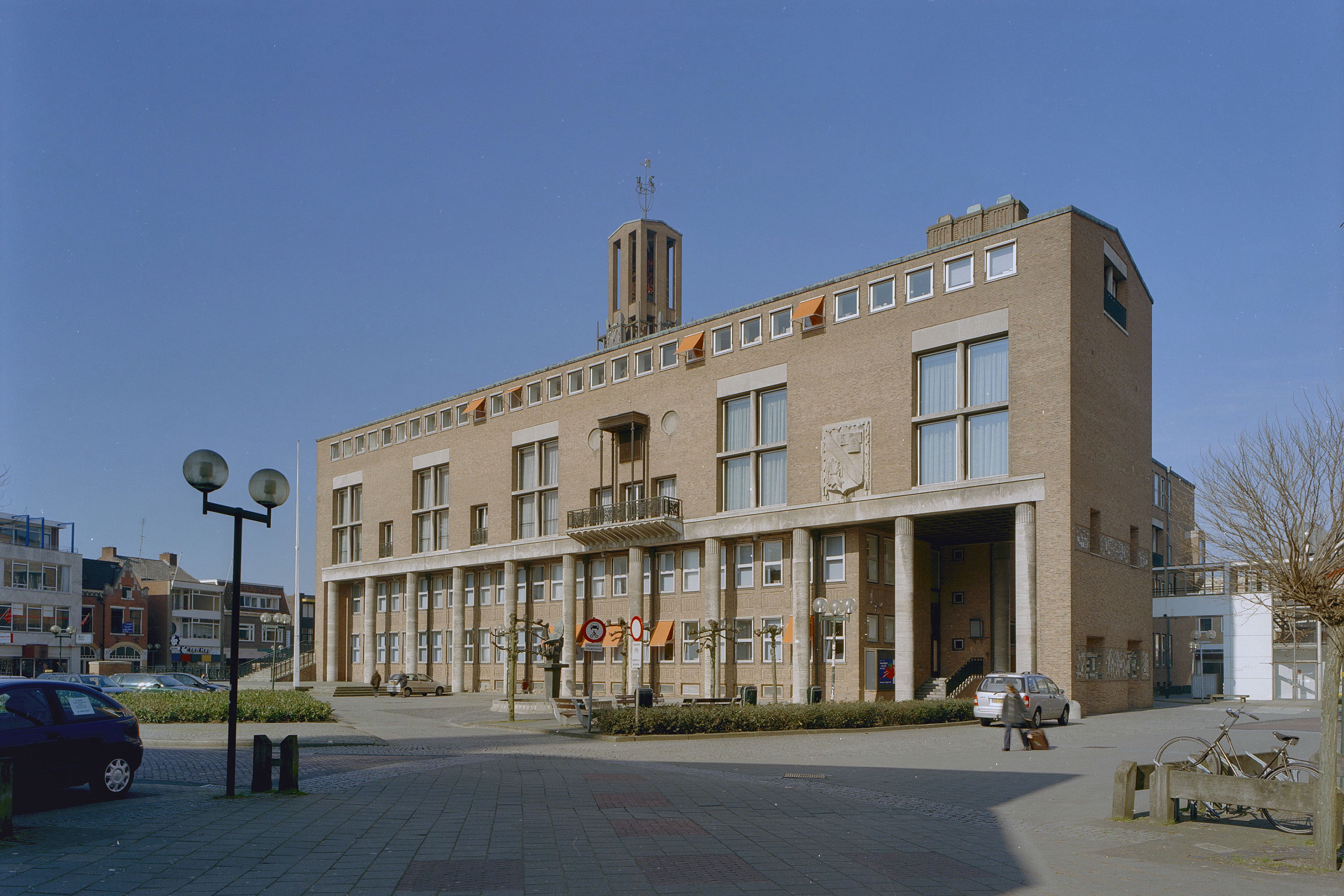 Stadhuis: Overzicht achtergevel en rechter zijgevel met galerij (opmerking: Gefotografeerd voor Toonbeelden van de Wederopbouw)